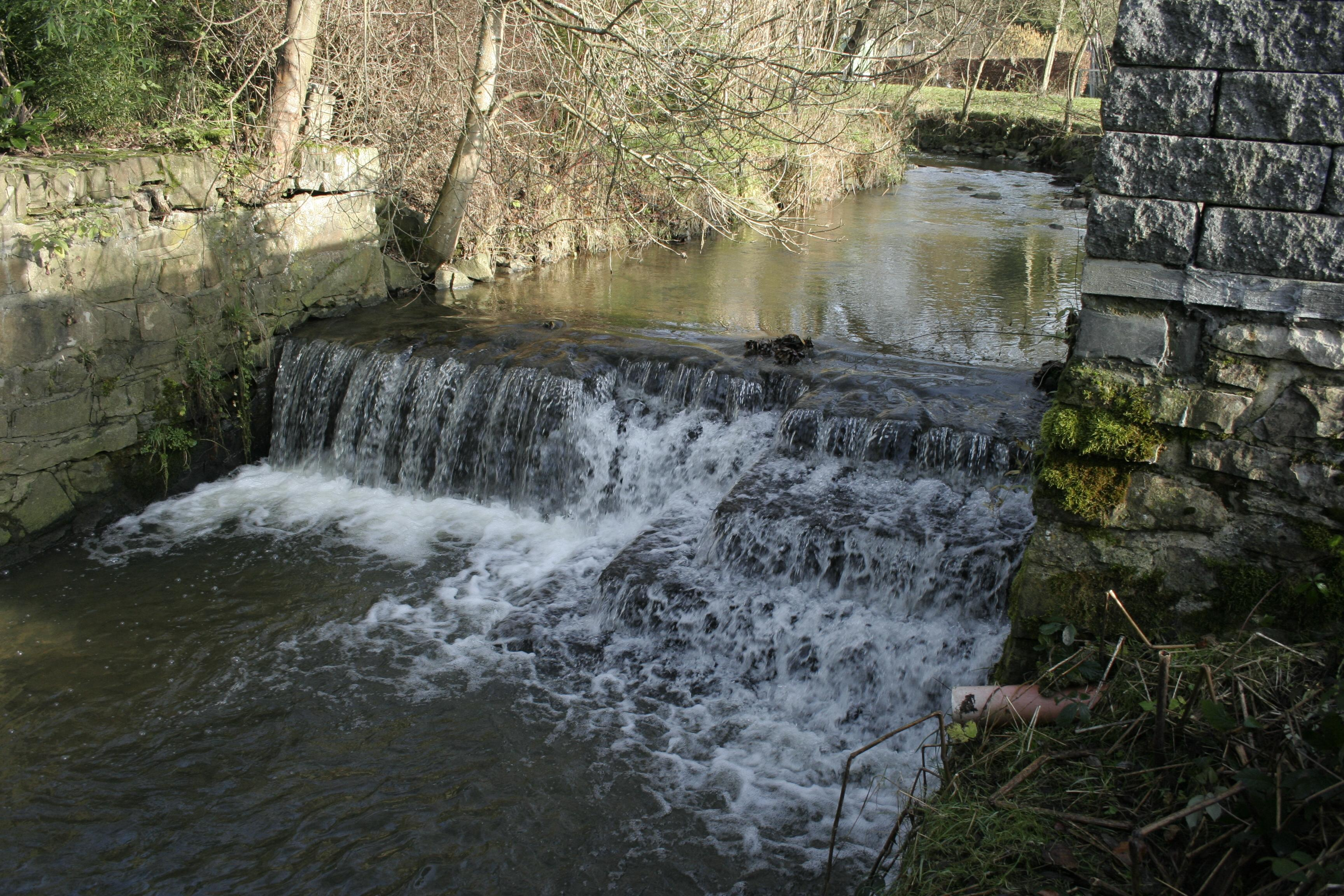 Der Mehrbach bei Mehren im Westerwald